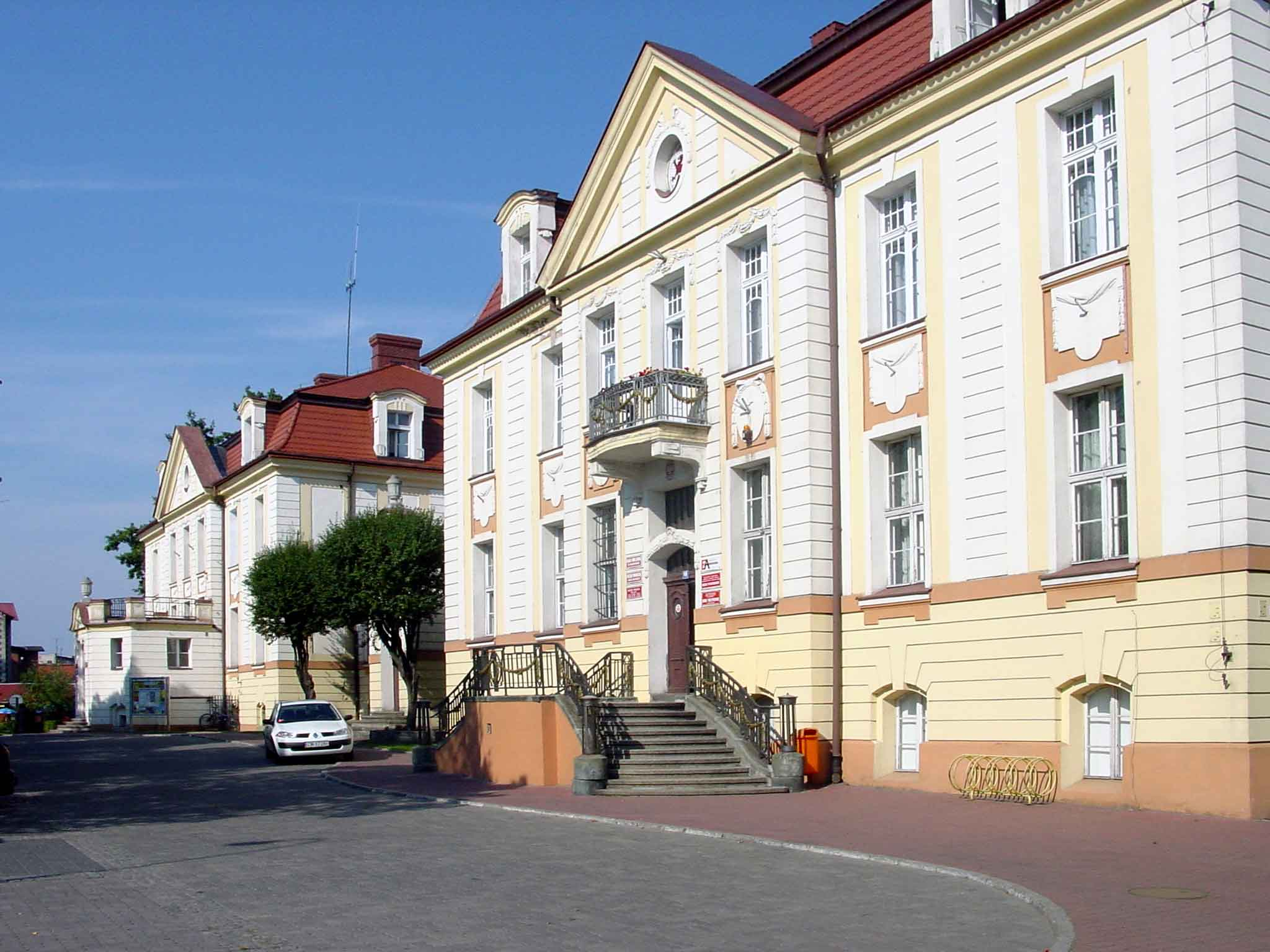 Białogard, siedziba władz miasta; autor zdjęcia Kluka, 12.10.2003r.